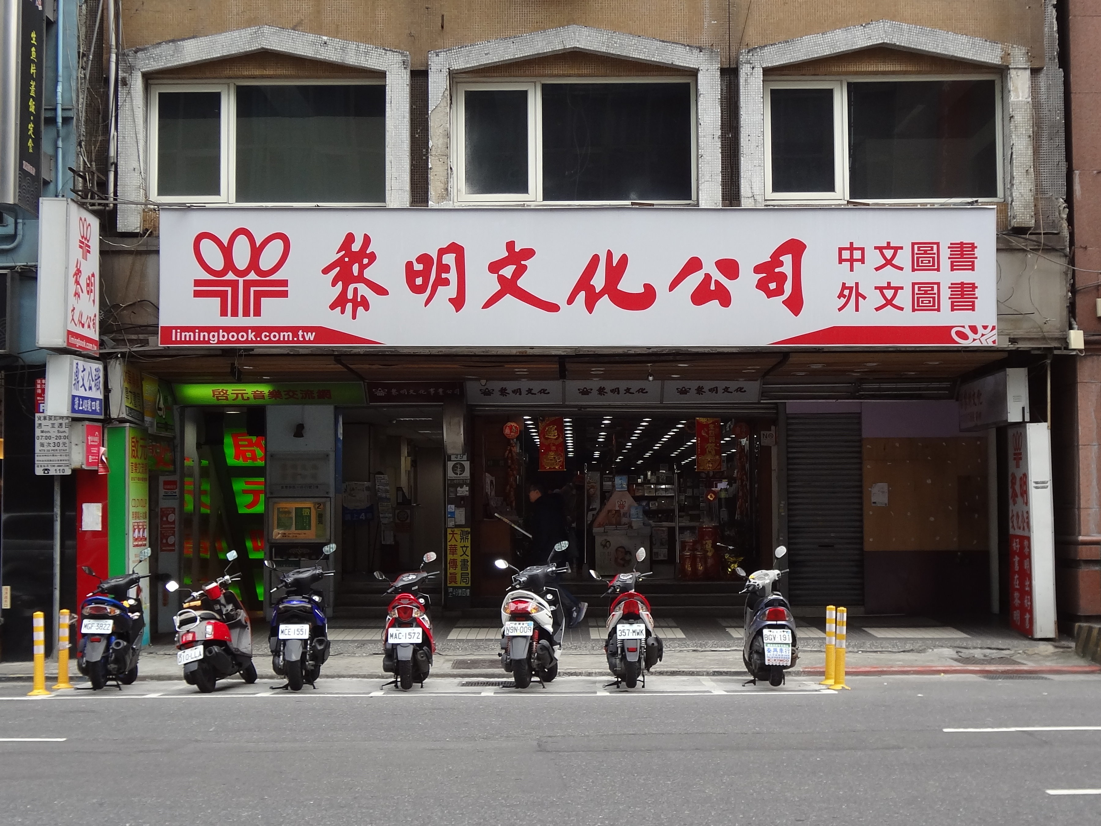 黎明文化臺北門市，位於臺北市中正區重慶南路一段49號1樓。